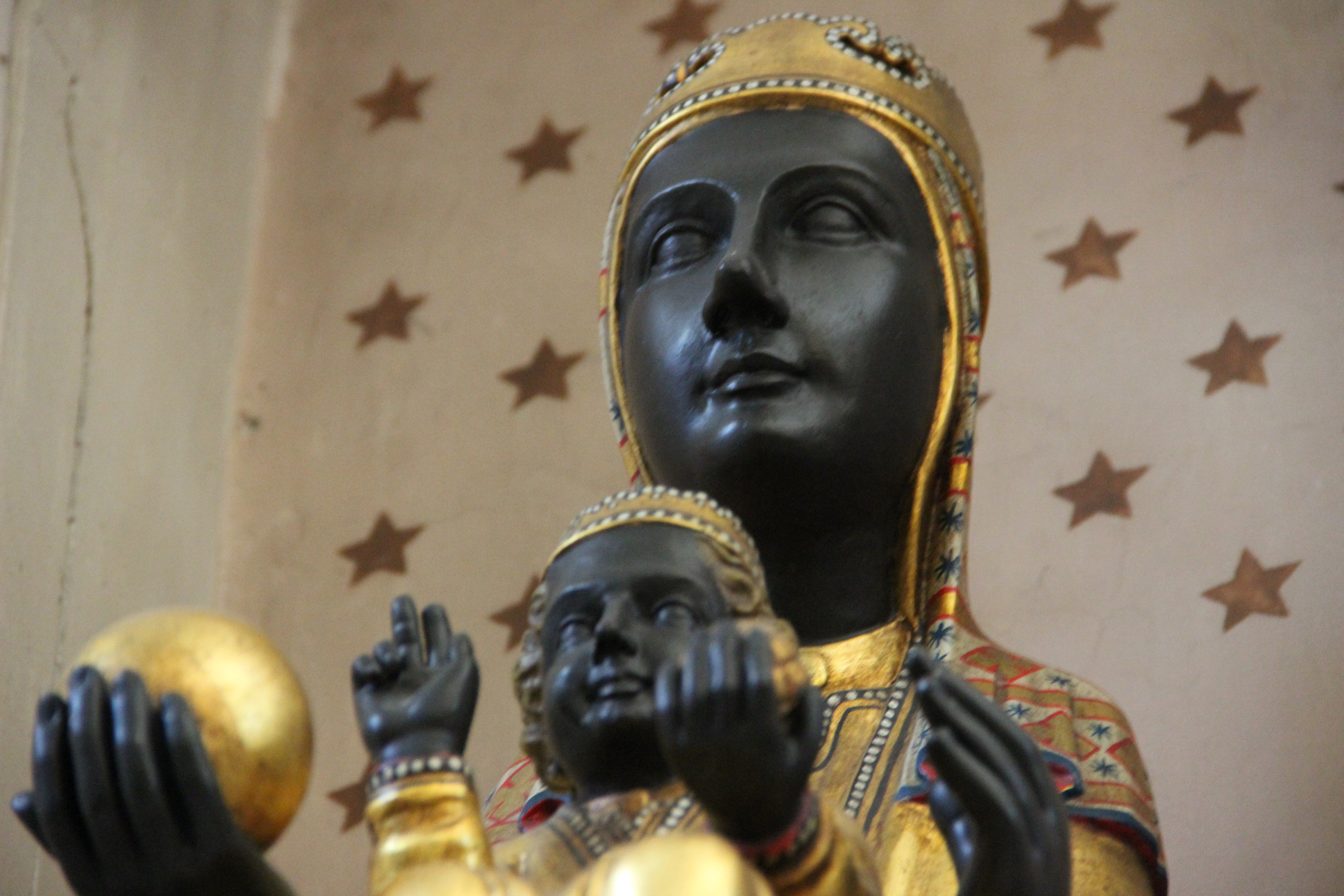 Statue de la Vierge de Montserrat dans l'église Saint-Barthélemy de Halles-sous-les-Côtes (Meuse)